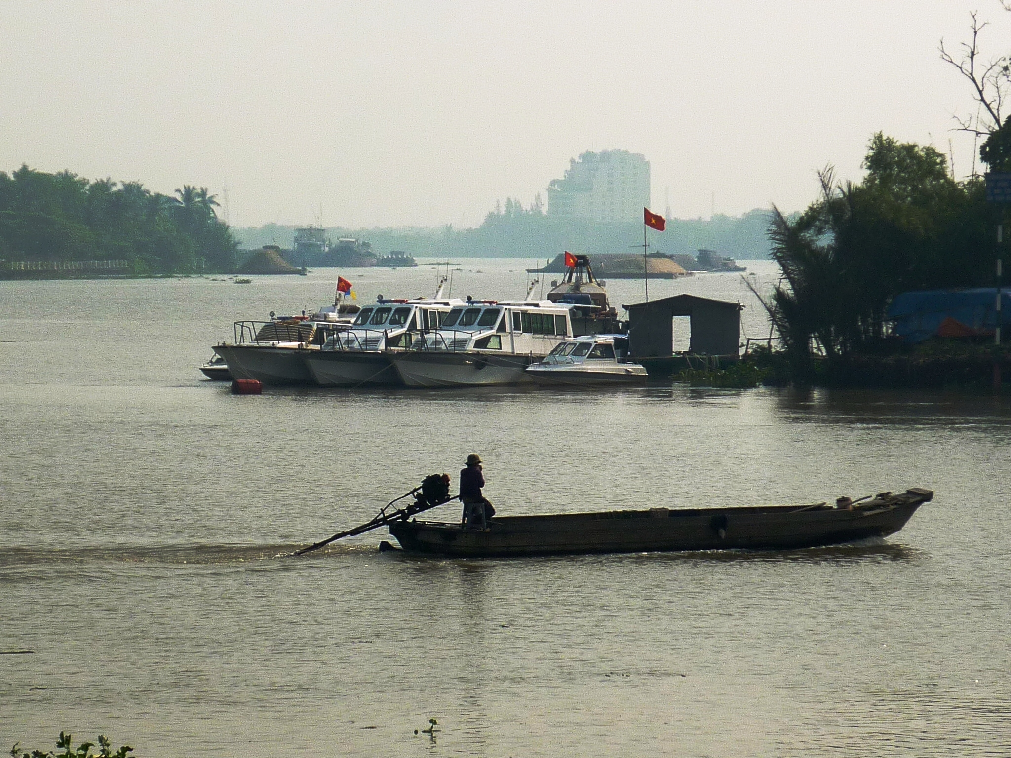 Tắc ráng lưu thông trên sông Sài Gòn gần cầu Bình Triệu, quận Bình Thạnh , thành phố Hồ Chí Minh